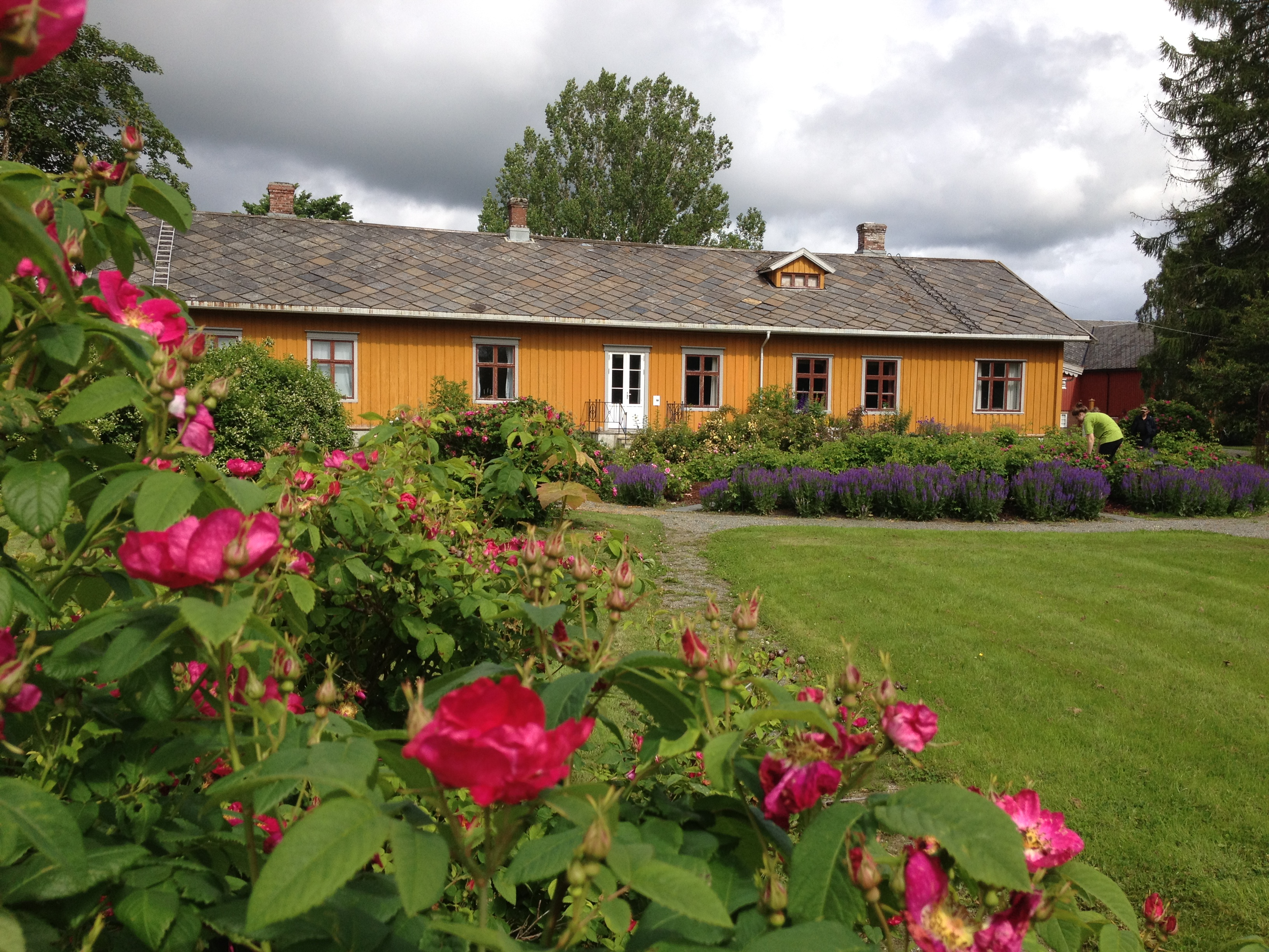 Værnes gamle prestegård, nå en del av Stjørdal museum Værnes